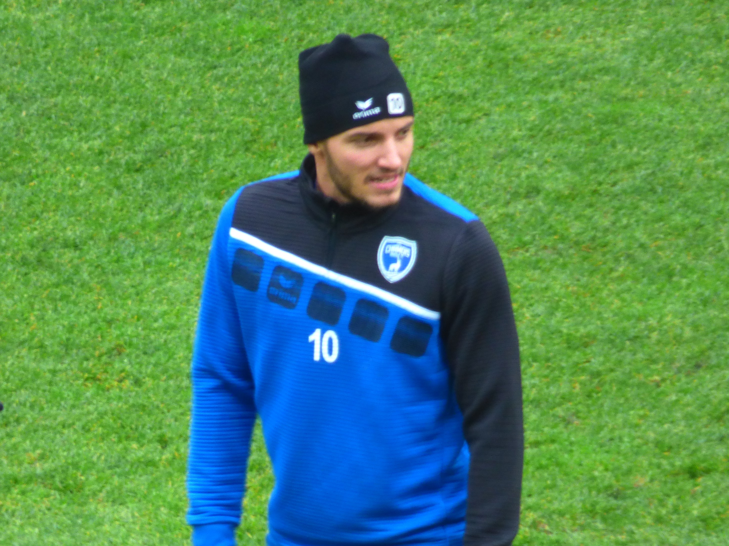 Valentin Jacob avant le match Lens / Niort, le 21 décembre 2019, comptant pour la dix-neuvième journée du championnat de France de football de Ligue 2 2019-2020.